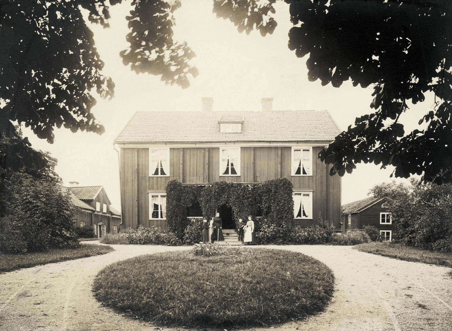 Depicted place: Småland, Sevede hd, Södra Vi, Sund (Sverige (SE))